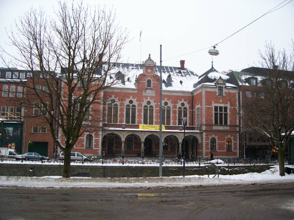 Norrlands nation in Uppsala.